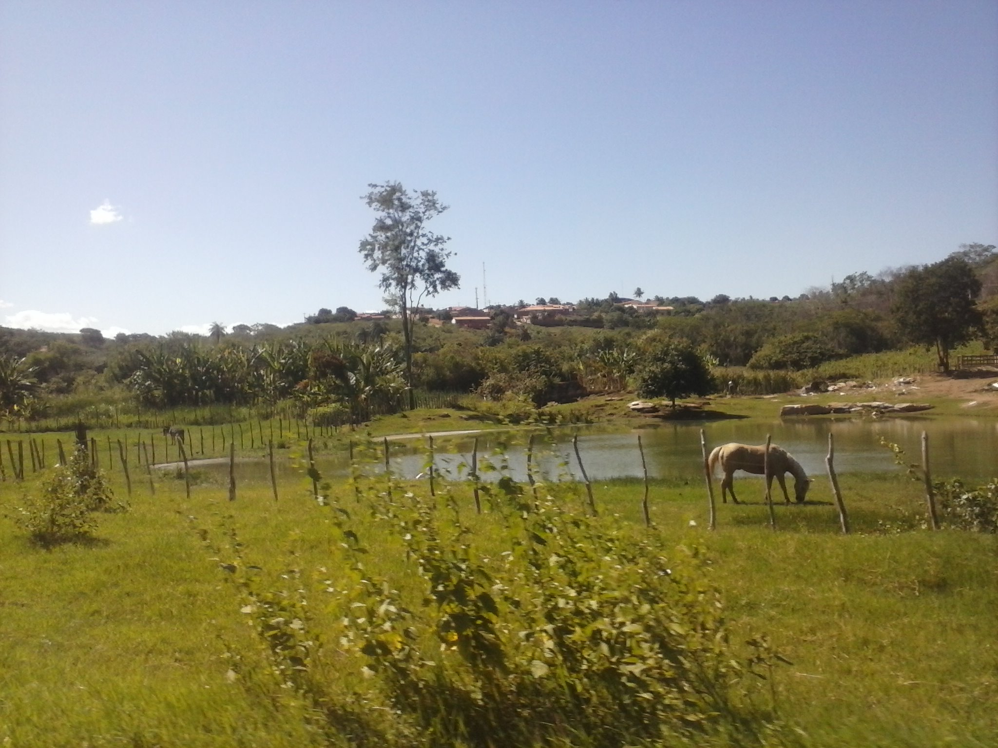 Chegando em Altaneira